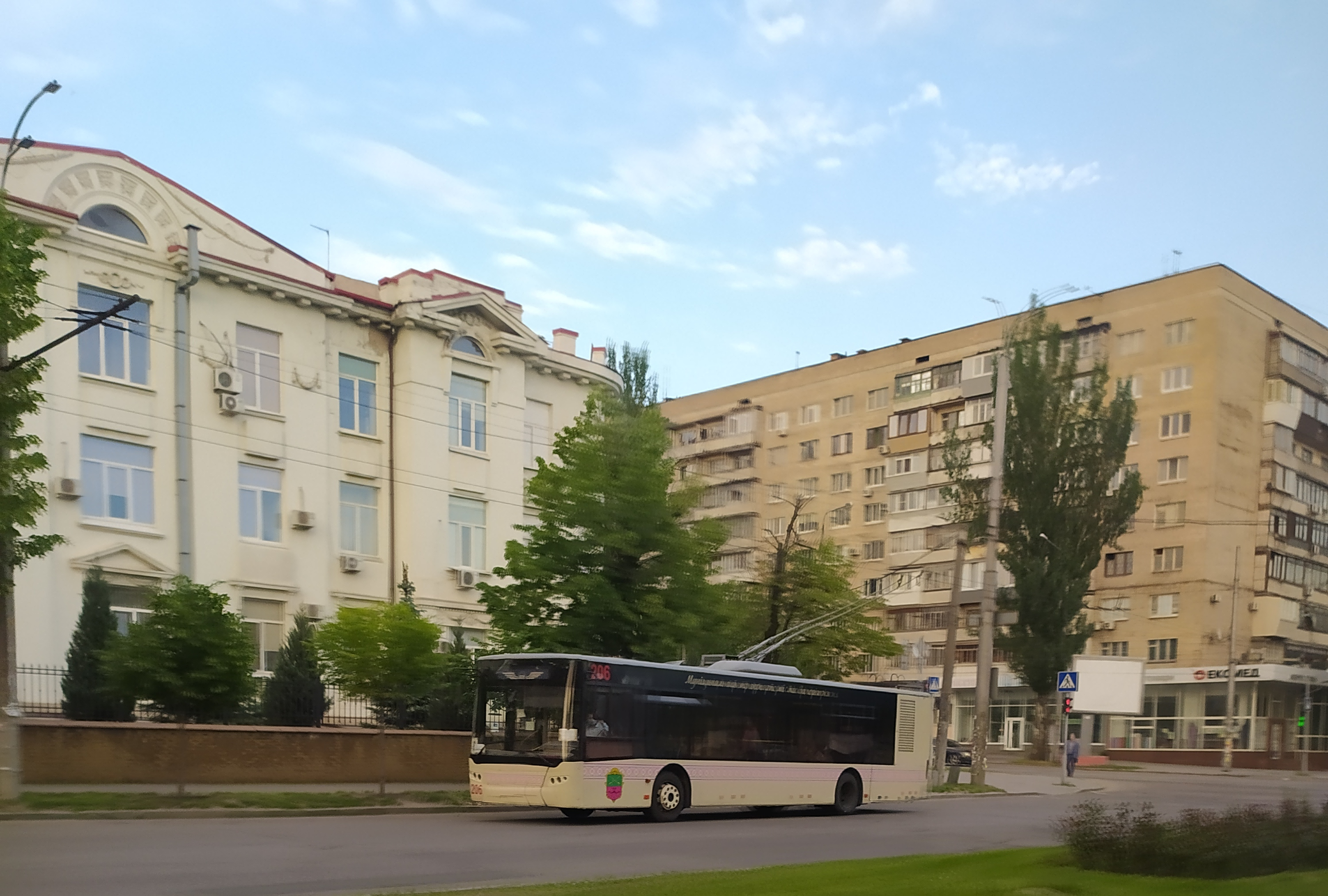 Запоріжжя. Соборний проспект ЛАЗ E183D1 (№ 206) - маршрут № 8